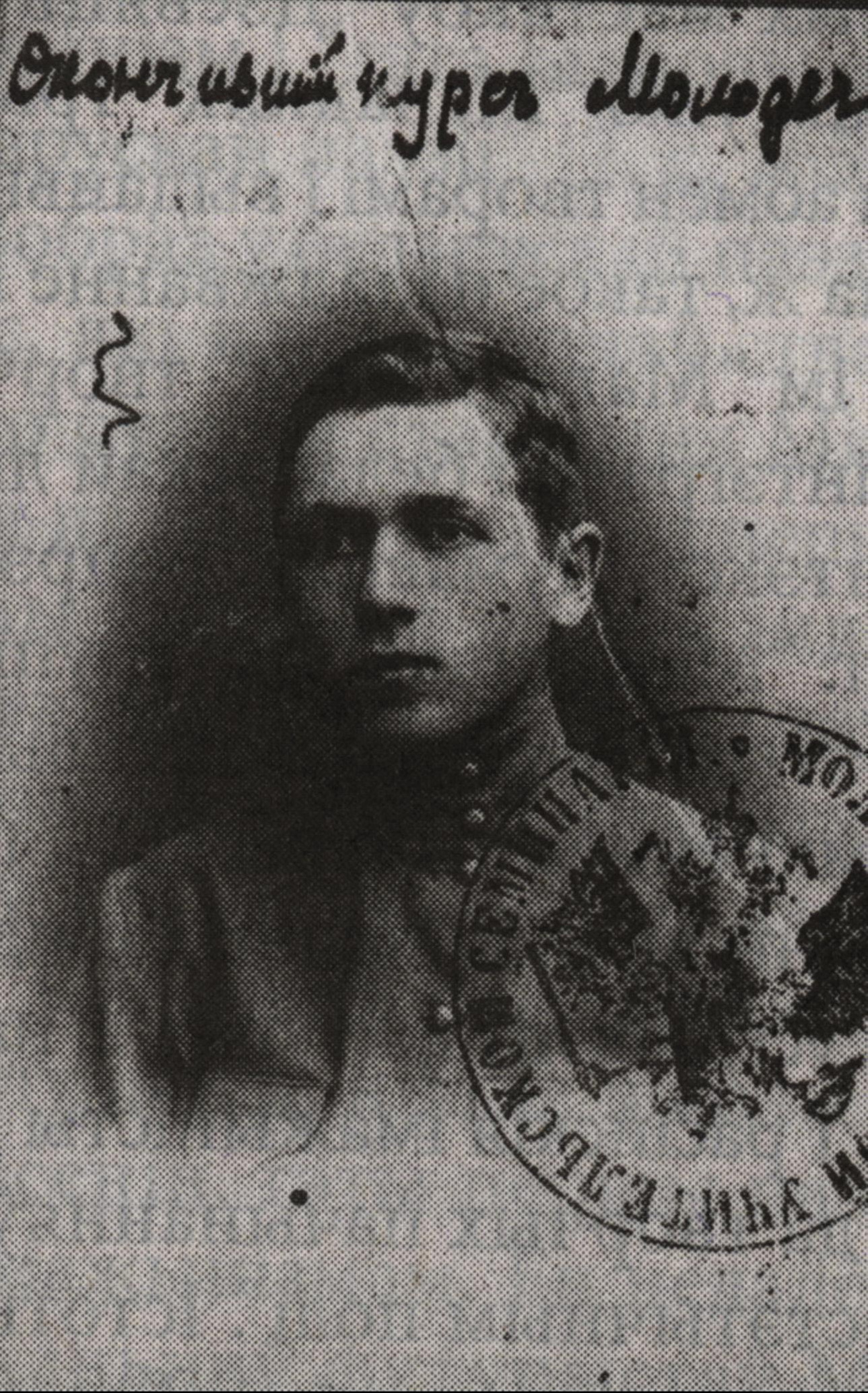 Беларуская (тарашкевіца): Беларускі паэт Міхась Чарот